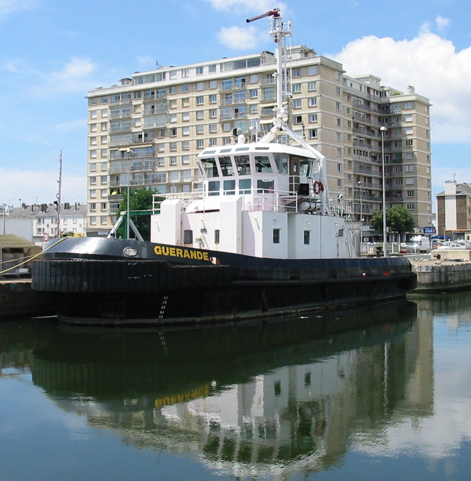 Remorqueur Guerande à Saint-Nazaire